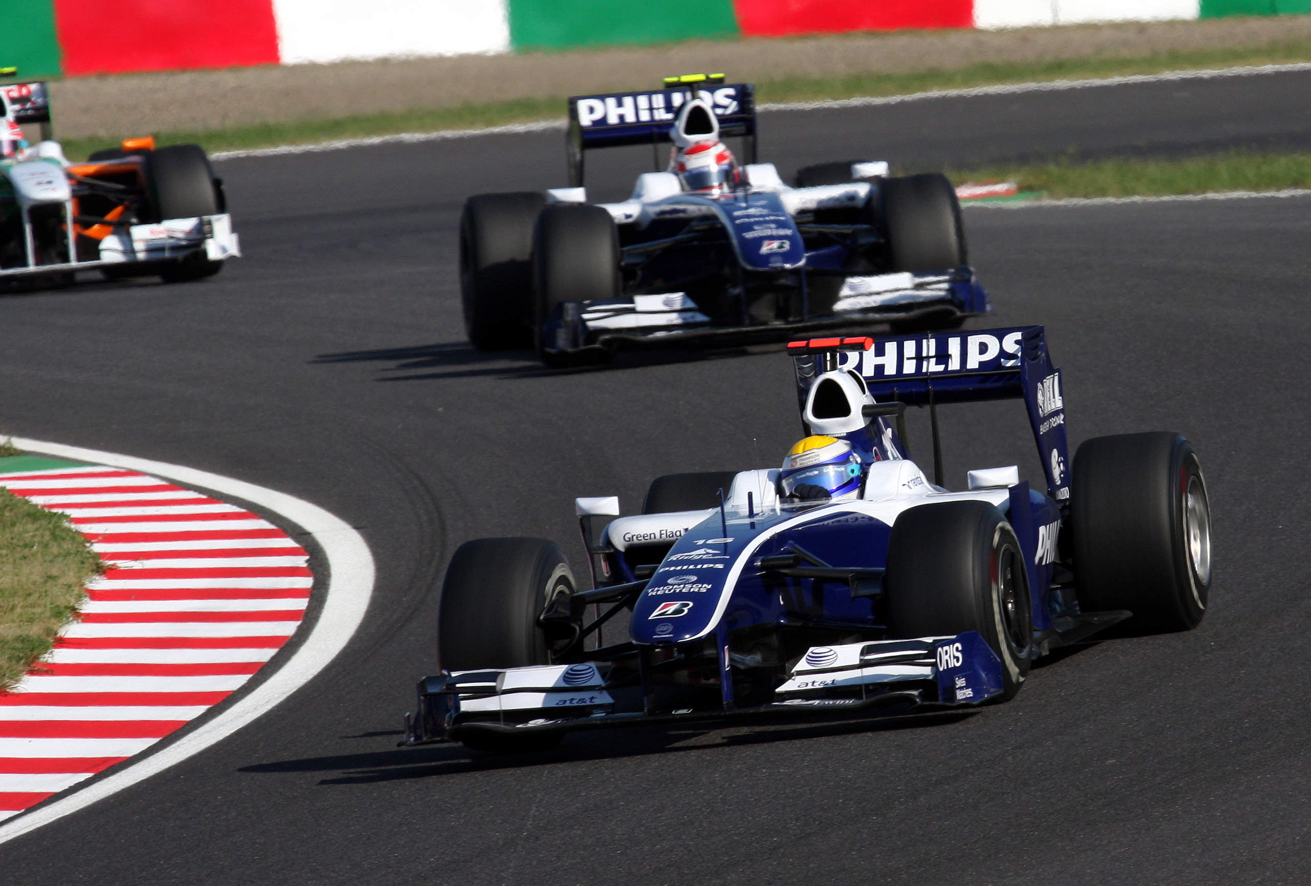 Formula One 2009 Rd.15 Japanese GP: Williams duo (Nico Rosberg and Kazuki Nakajima)